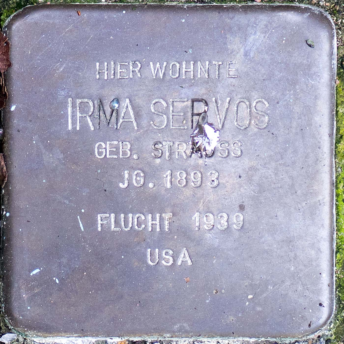 Stolperstein für Irma Servos (Willich)